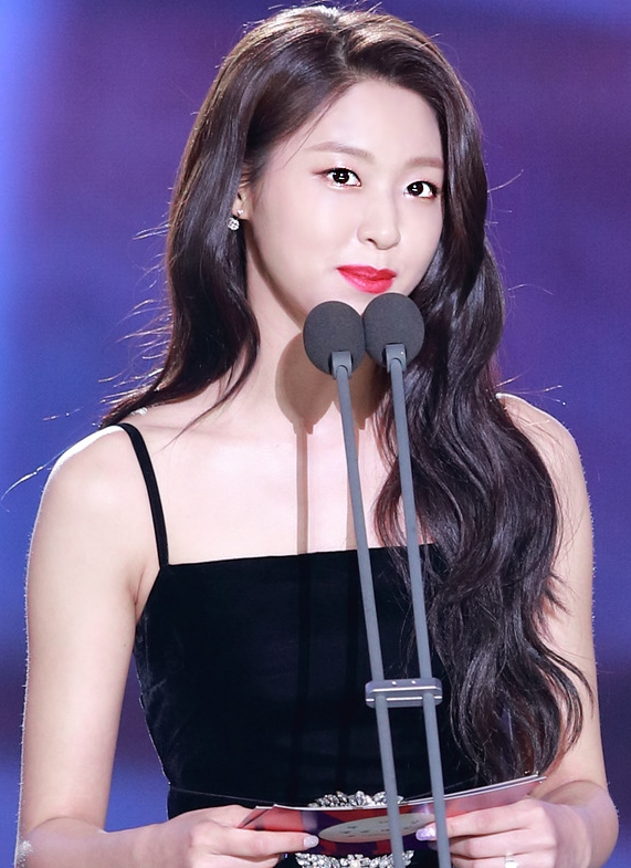 180503 AOA 설현 백상예술대상